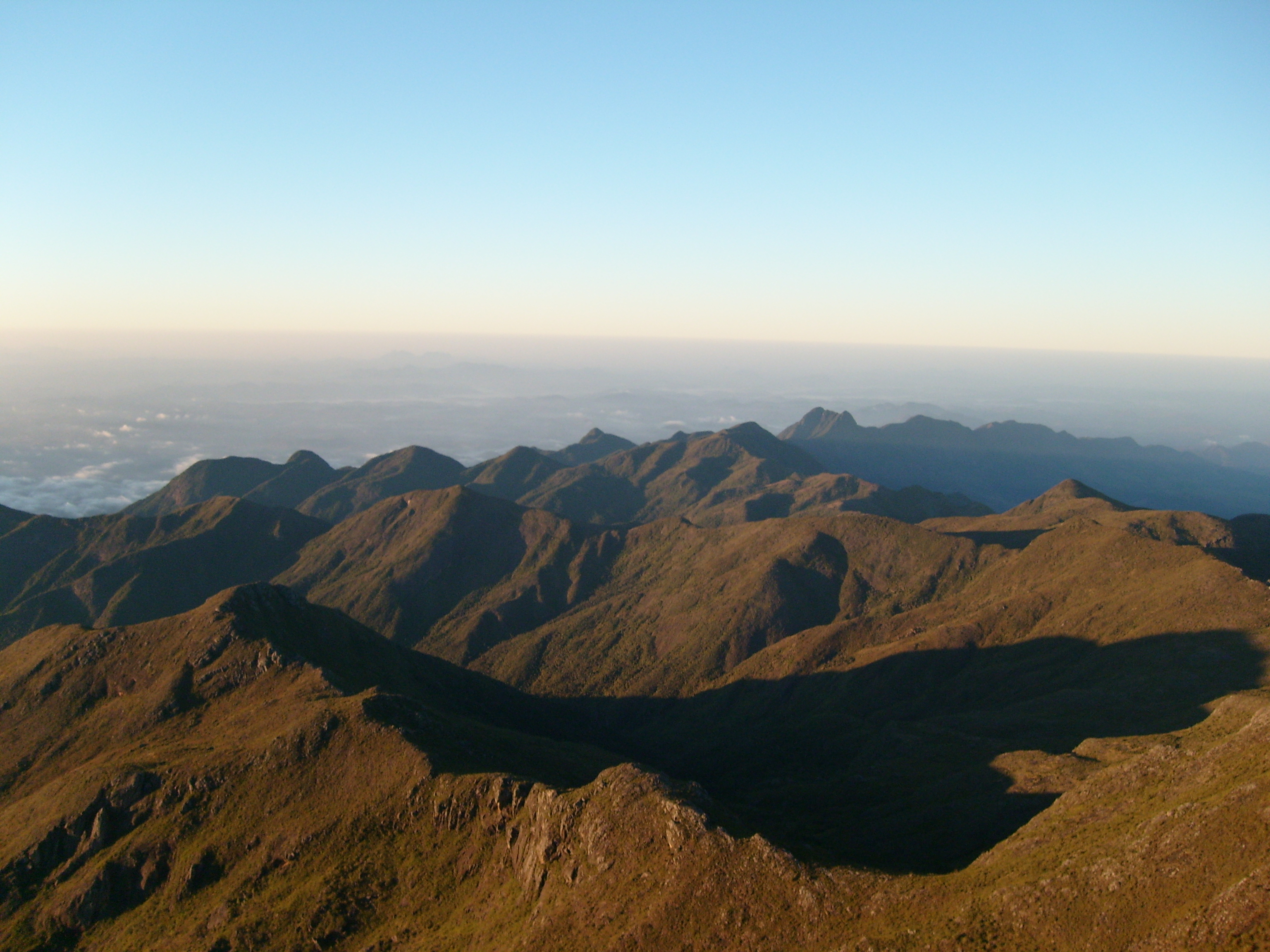 Panorama Serra do Espírito Santo vista do Pico da Bandeira.